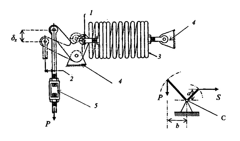 Основным элементом одного из распространенных типов опор постоянного усилия является рычажно-пружинный механизм, который обеспечивает незначительное изменение величины сжатия пружины в определенном интервале перемещений.